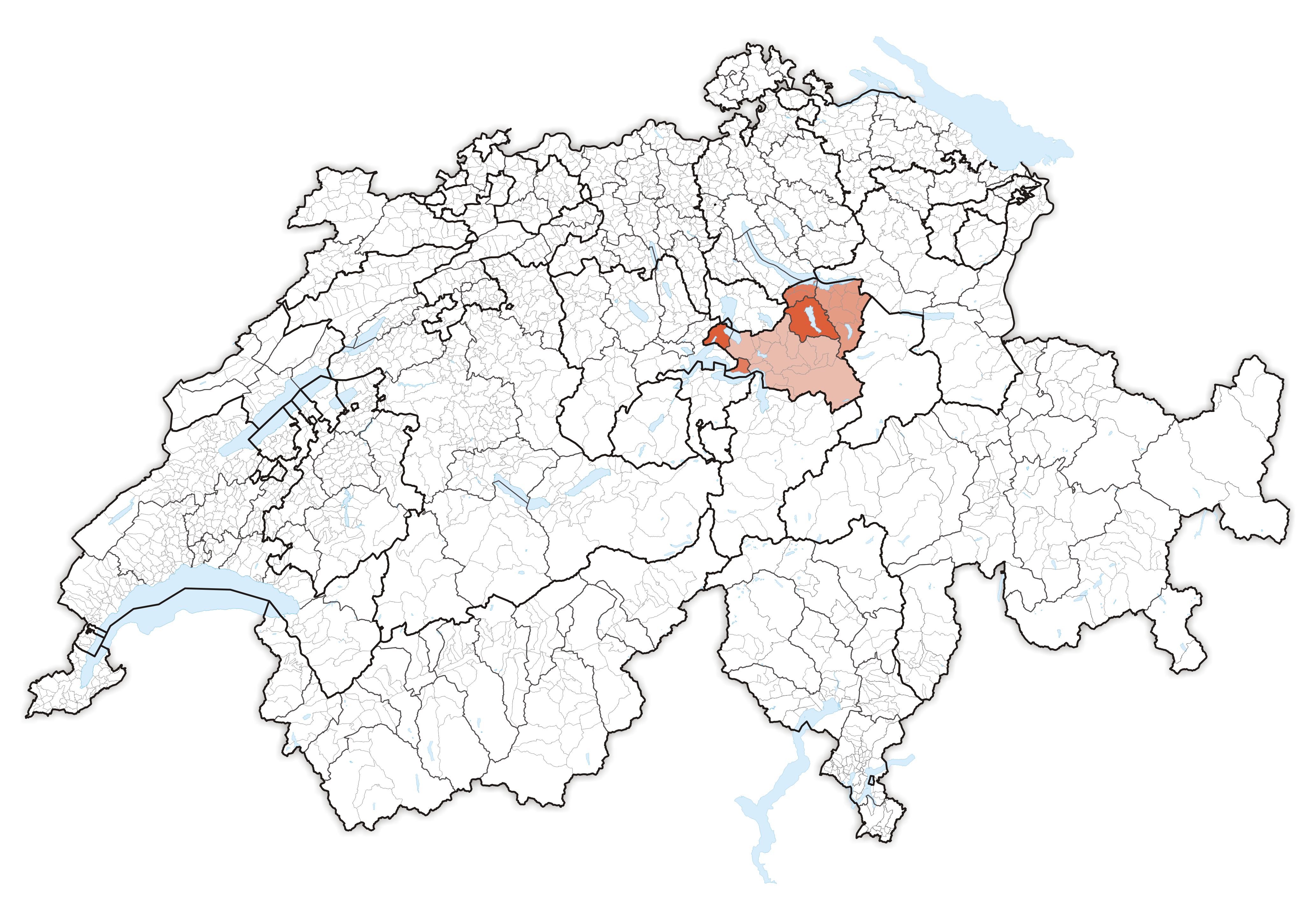 Canton Schwyz